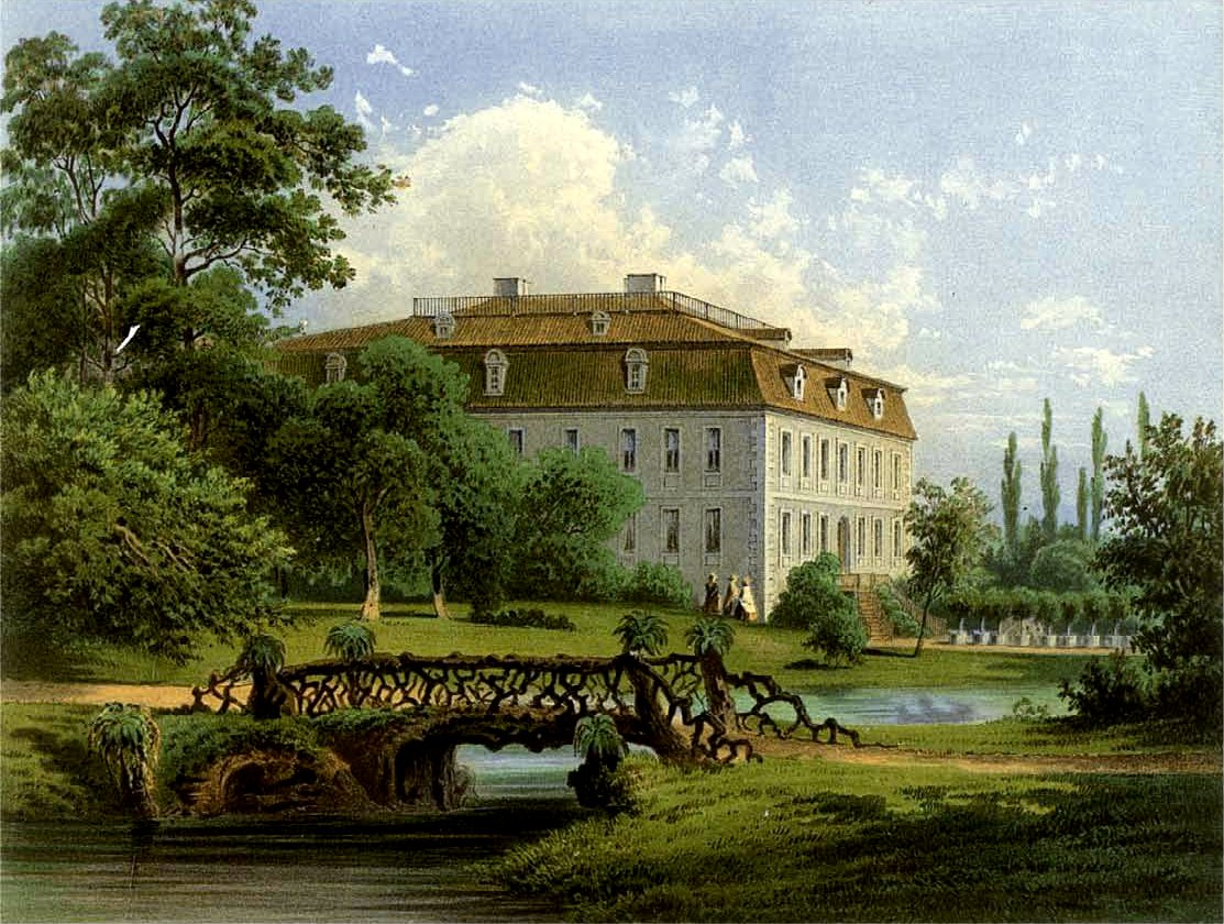 Schloss Poplitz, Lithografie aus dem 19. Jahrhundert